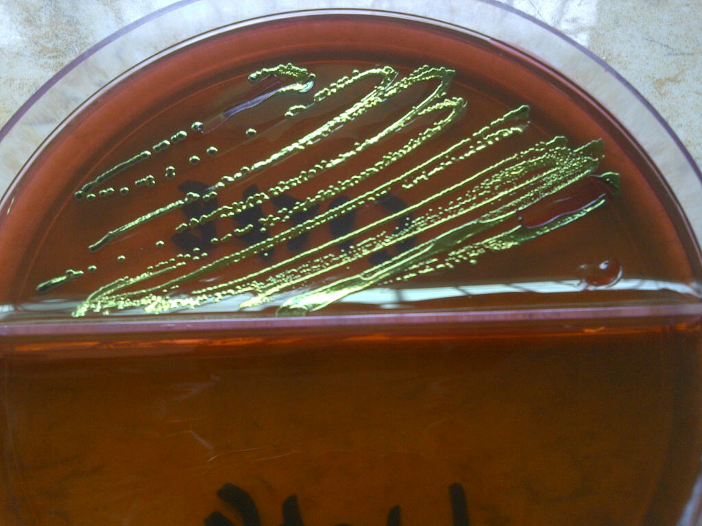 Crecimiento de colonias bacterianas de la especie E.coli en agar levine.